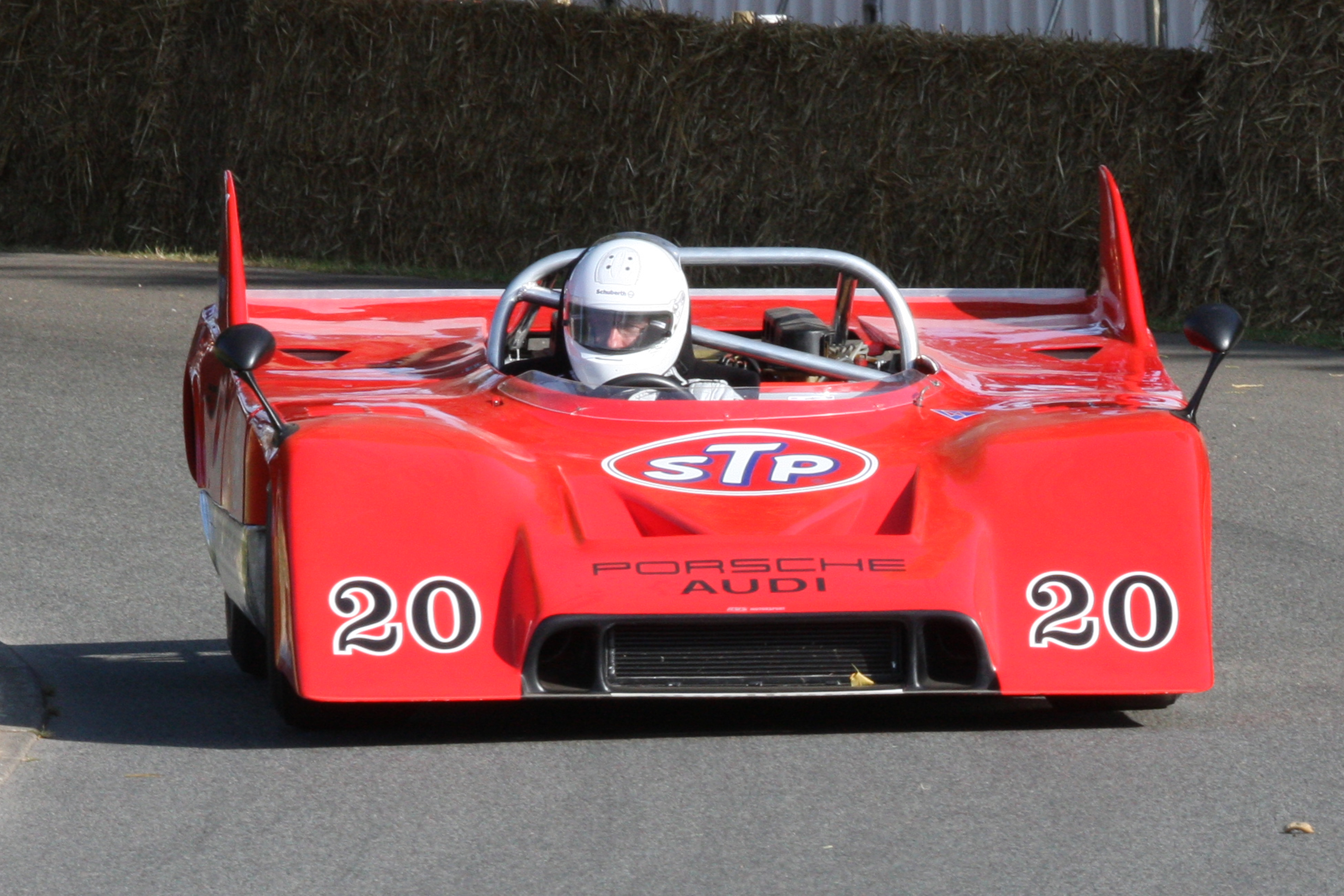 1971 Porsche 917/10 4.9 litre CanAm ex-Joseph Siffert